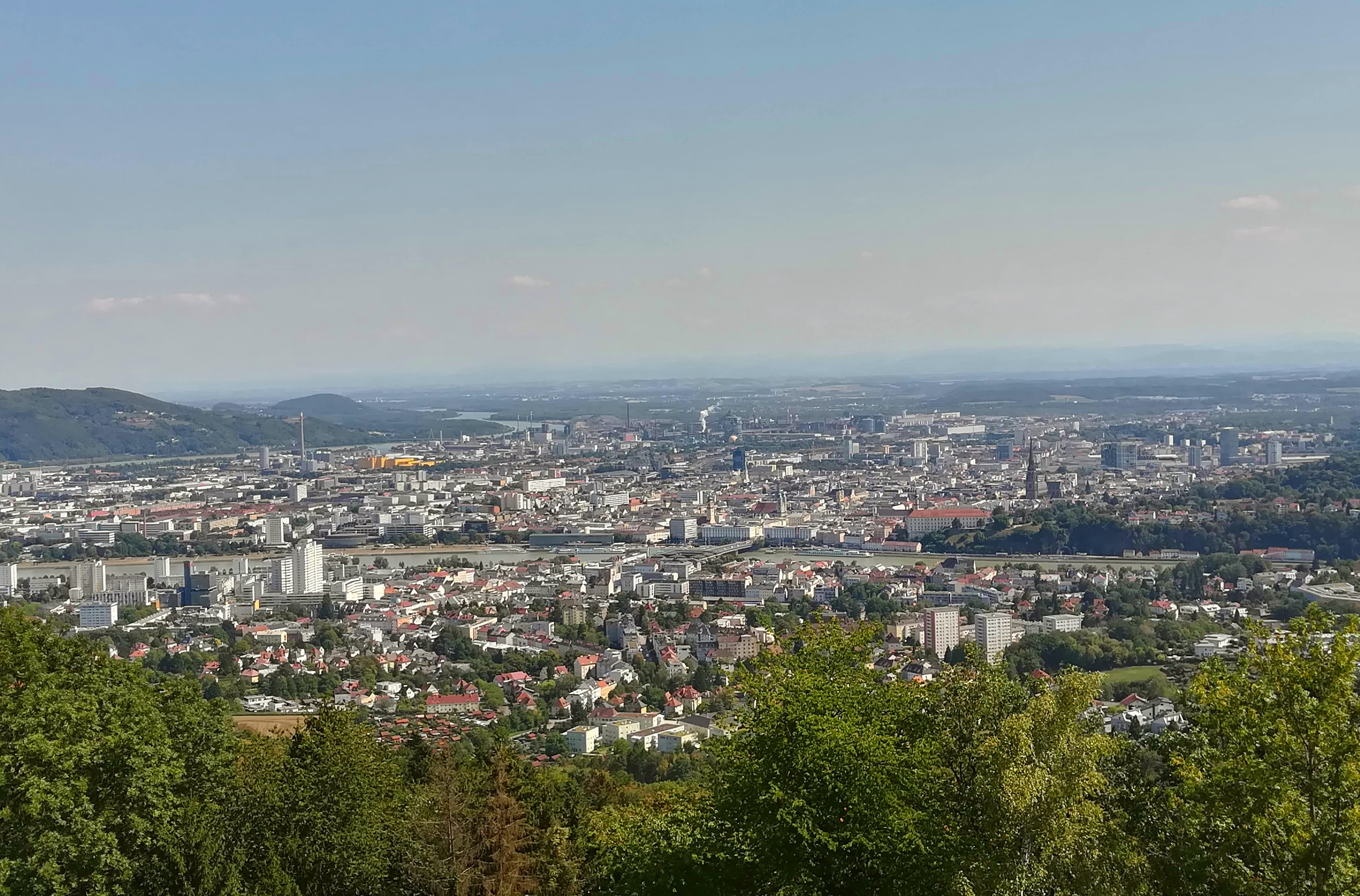 Blick über Linz, vom Pöstlingberg aus gesehen